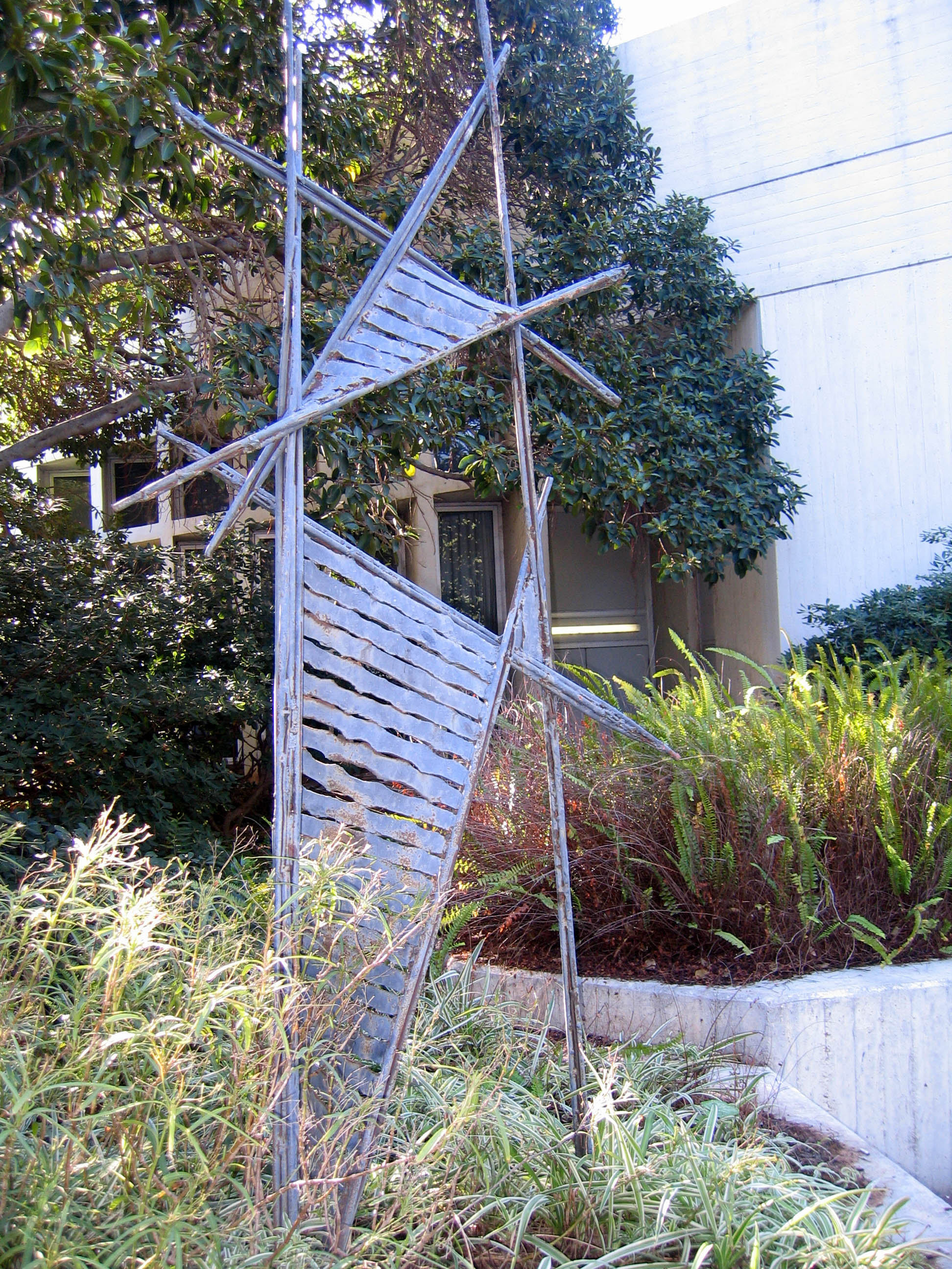 Sculpture